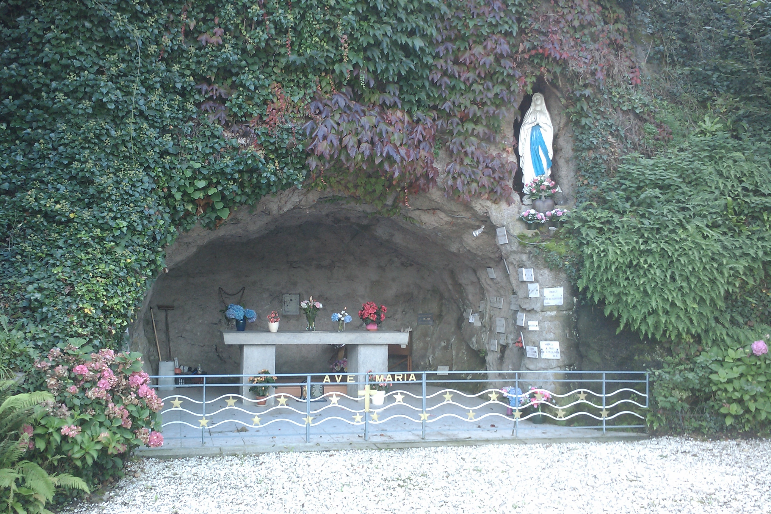 réplique de la Grotte de Massabielle